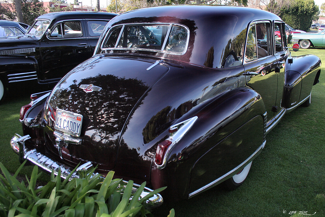 1941 Cadillac Fleetwood Sedan - burgundy - rvr